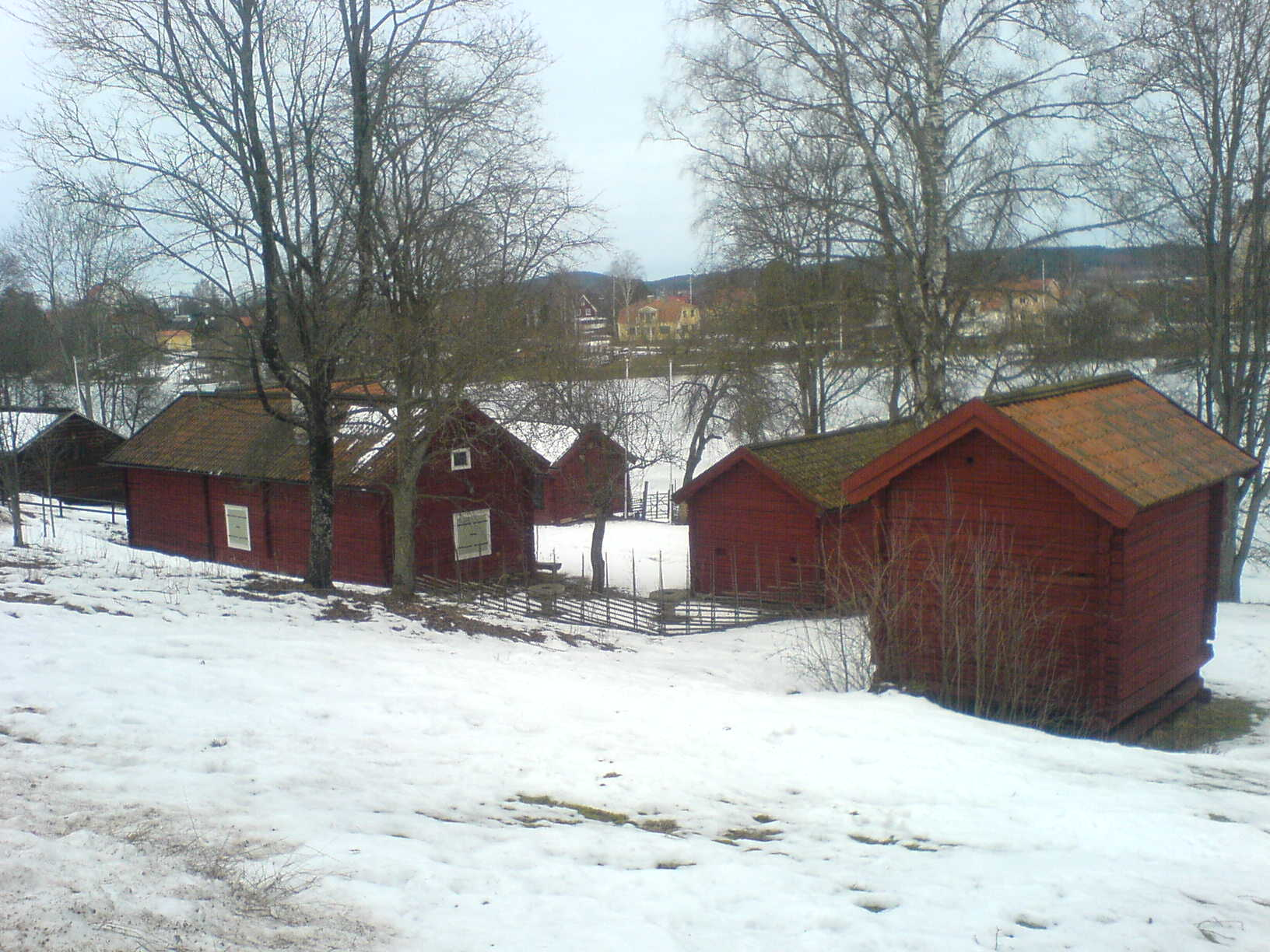 Hedemora gammelgård, Hedemora, Sweden